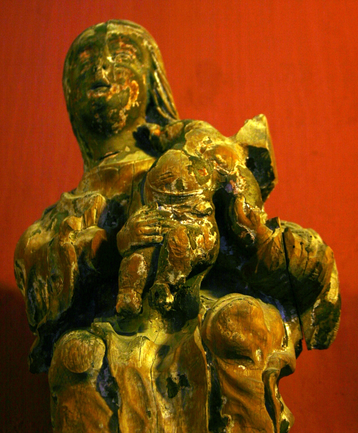 Madonna visigoda